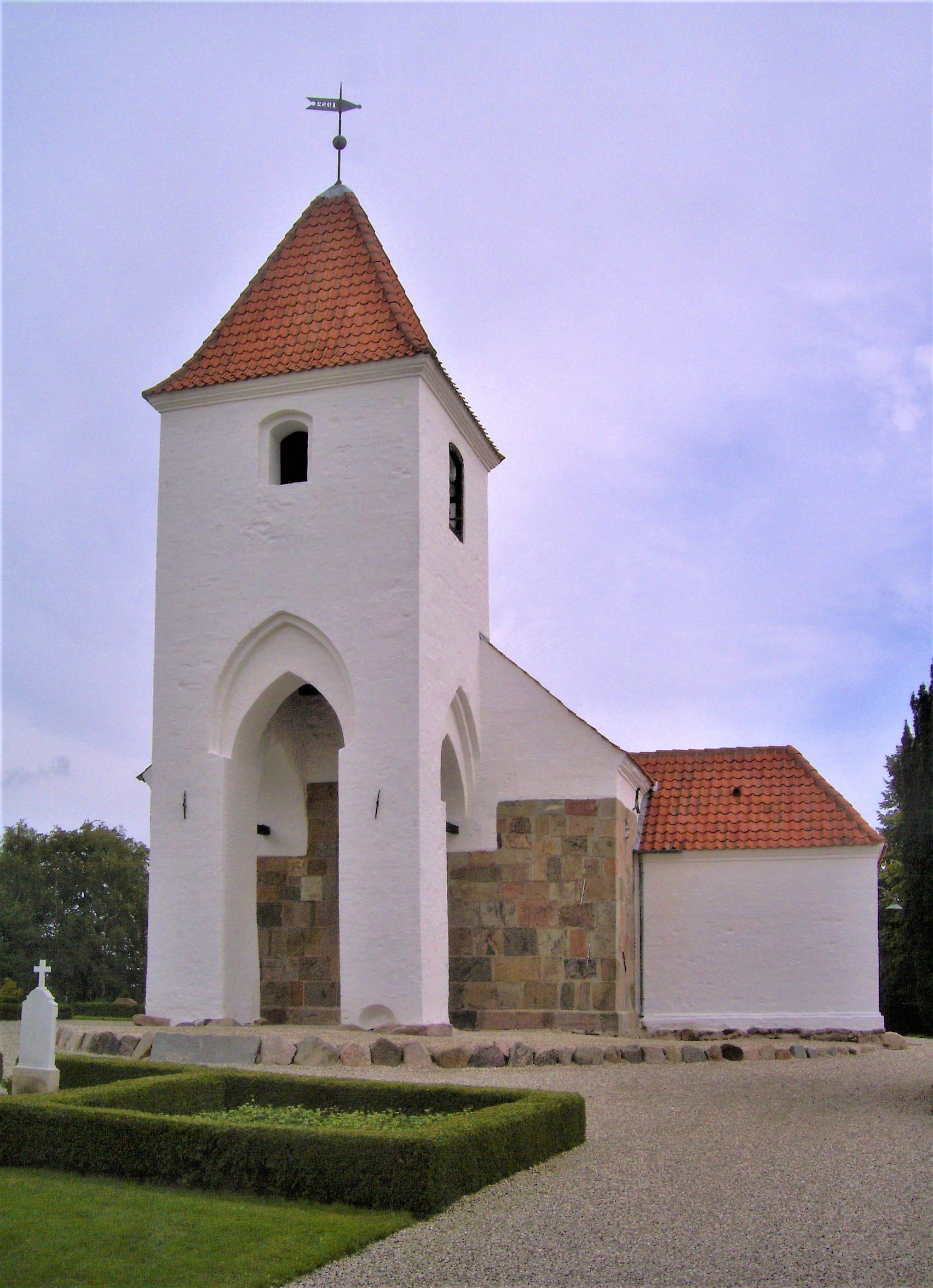 Voer Kirke,Rougsø Kommune, fra vest